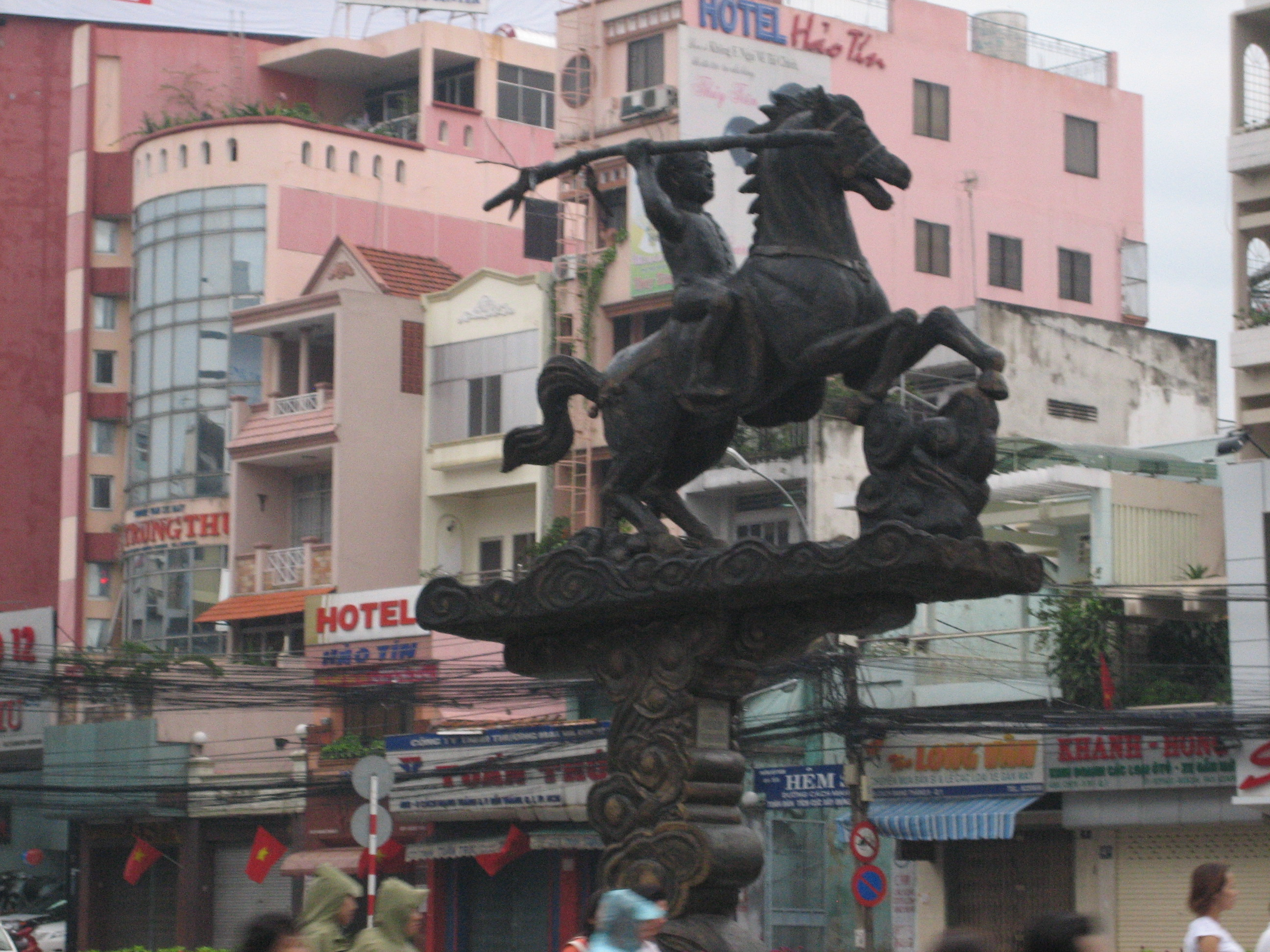 Thanh Giong statue, Ho Chi Minh City.